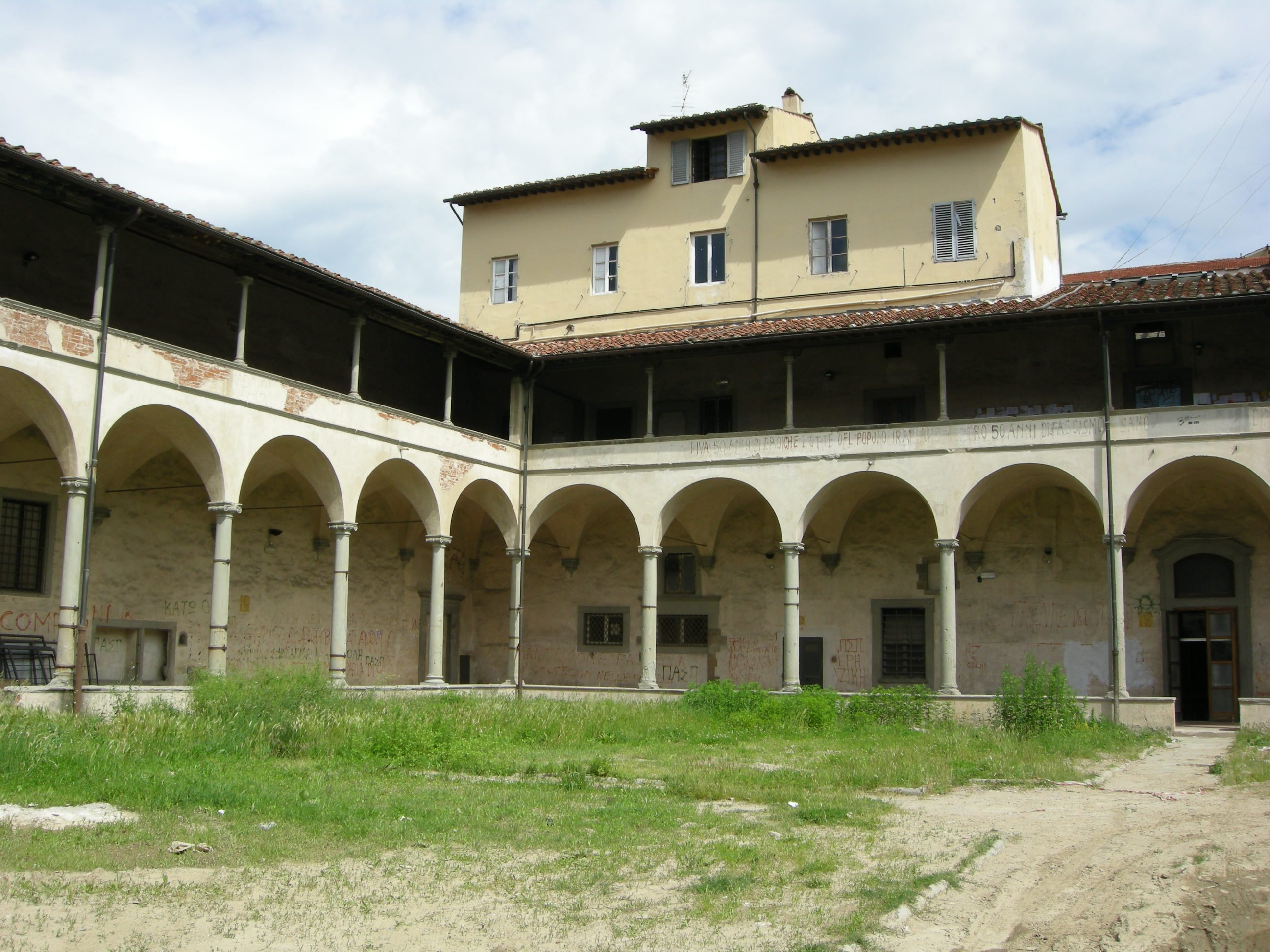 Sant'apollonia, chiostro grande